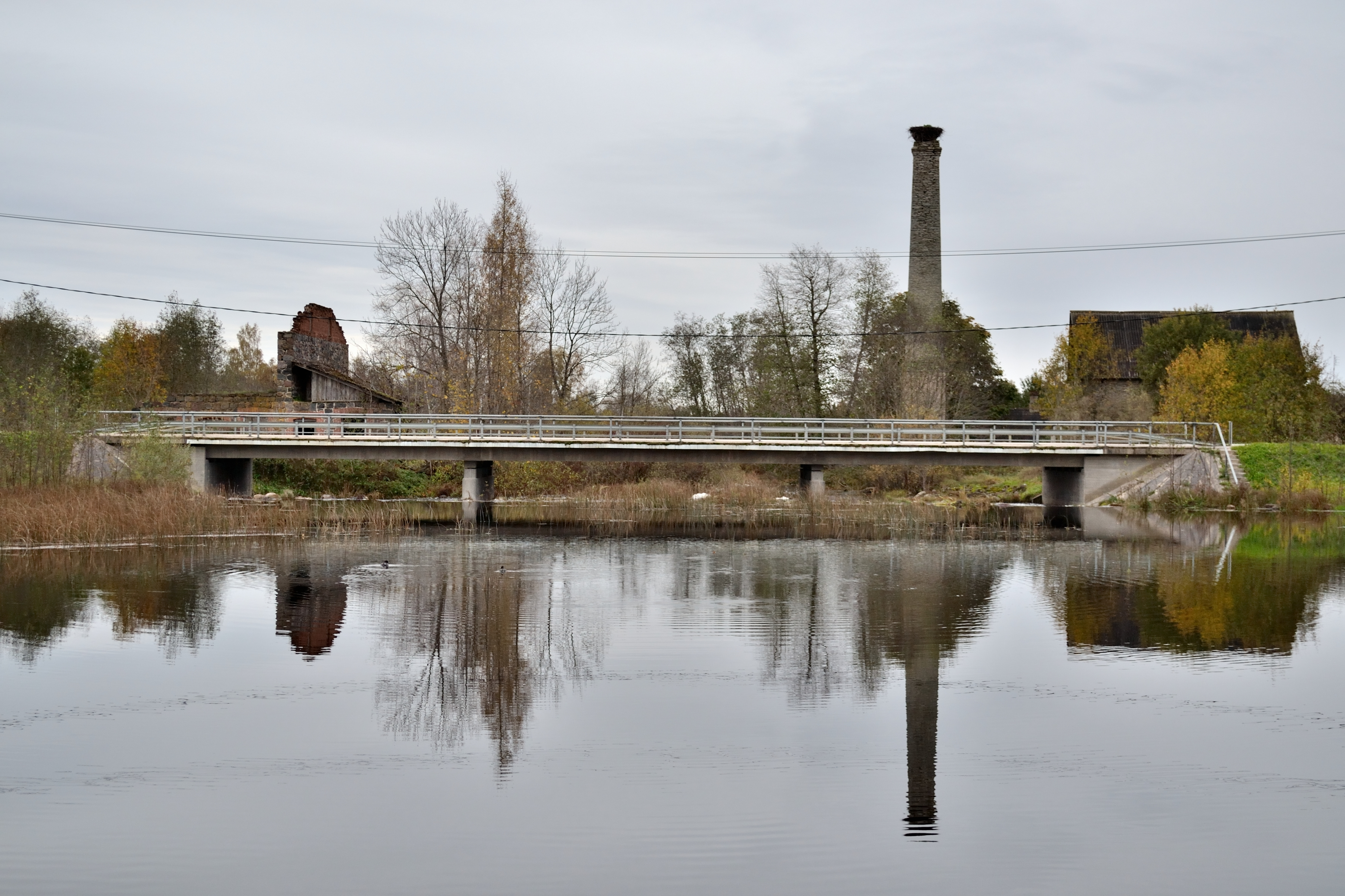 Pajaka sild Kasari jõel